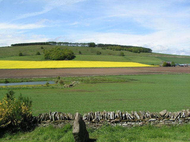 Nechtansmere